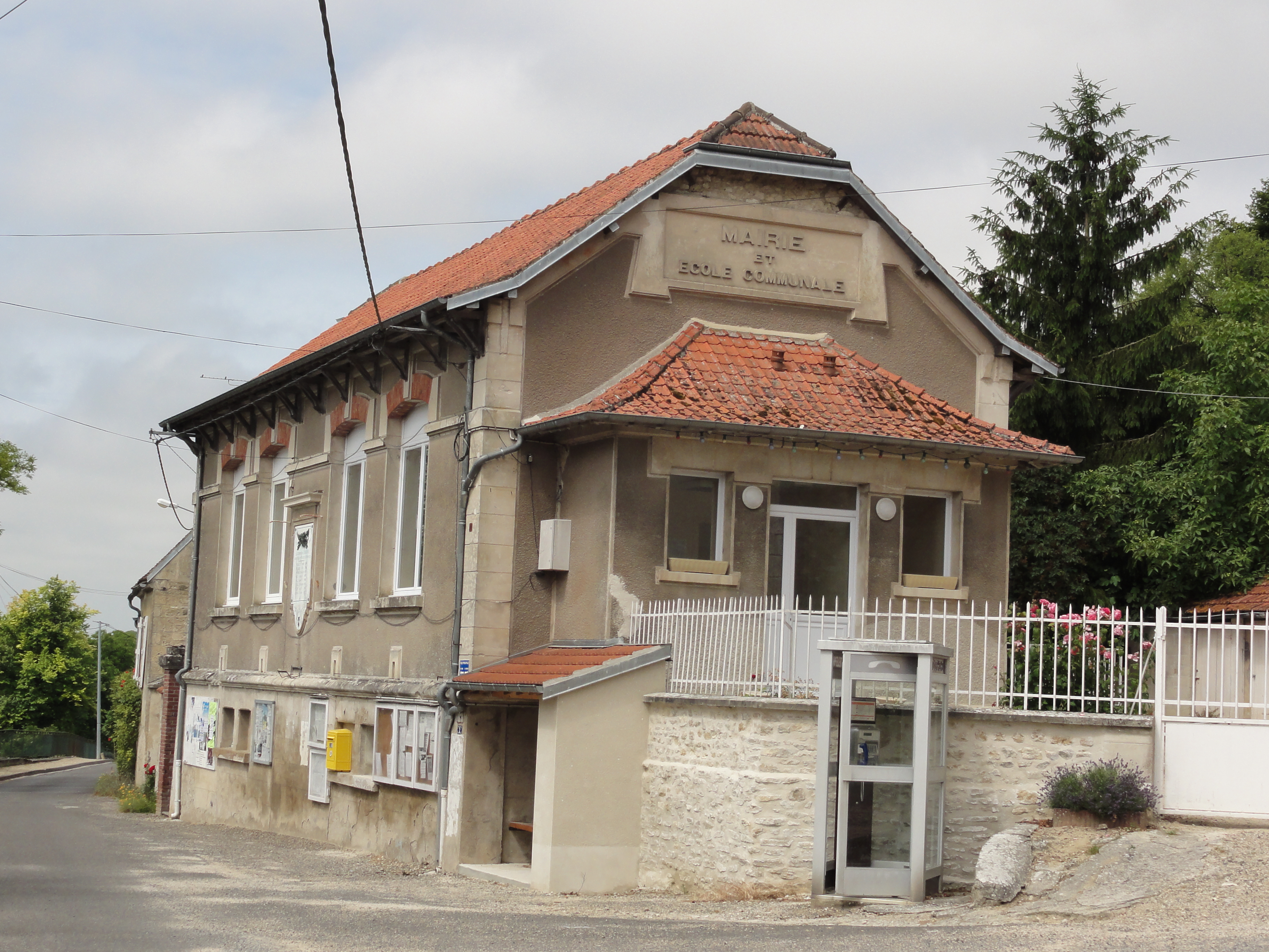 Pargnan (Aisne) mairie-école